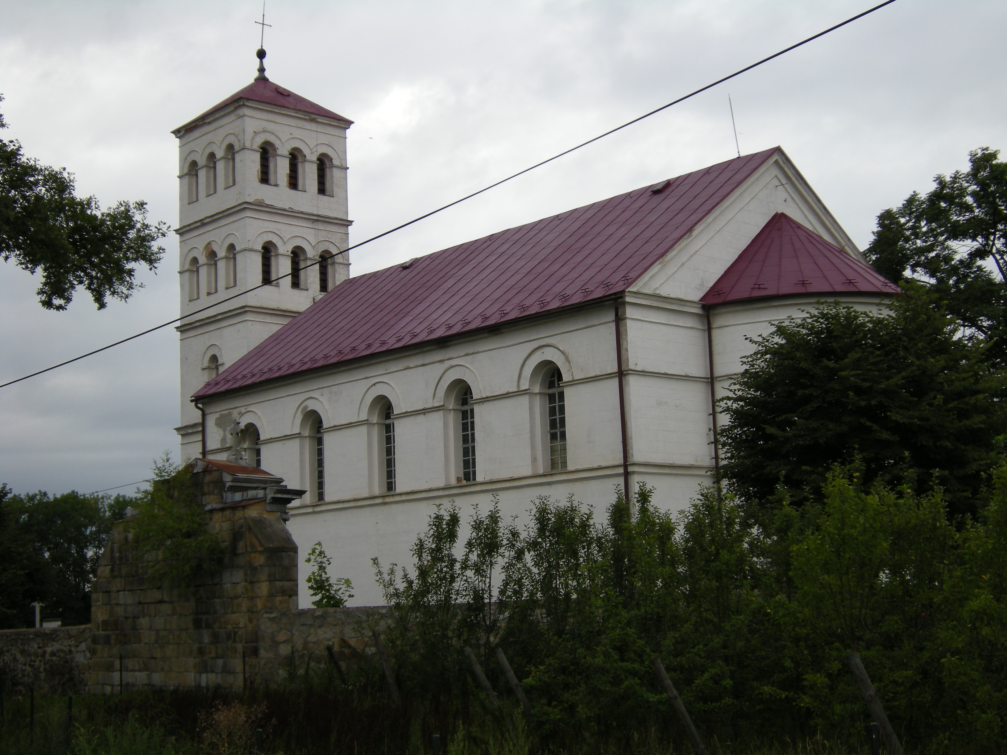 Kościół w Jasienicy Górnej